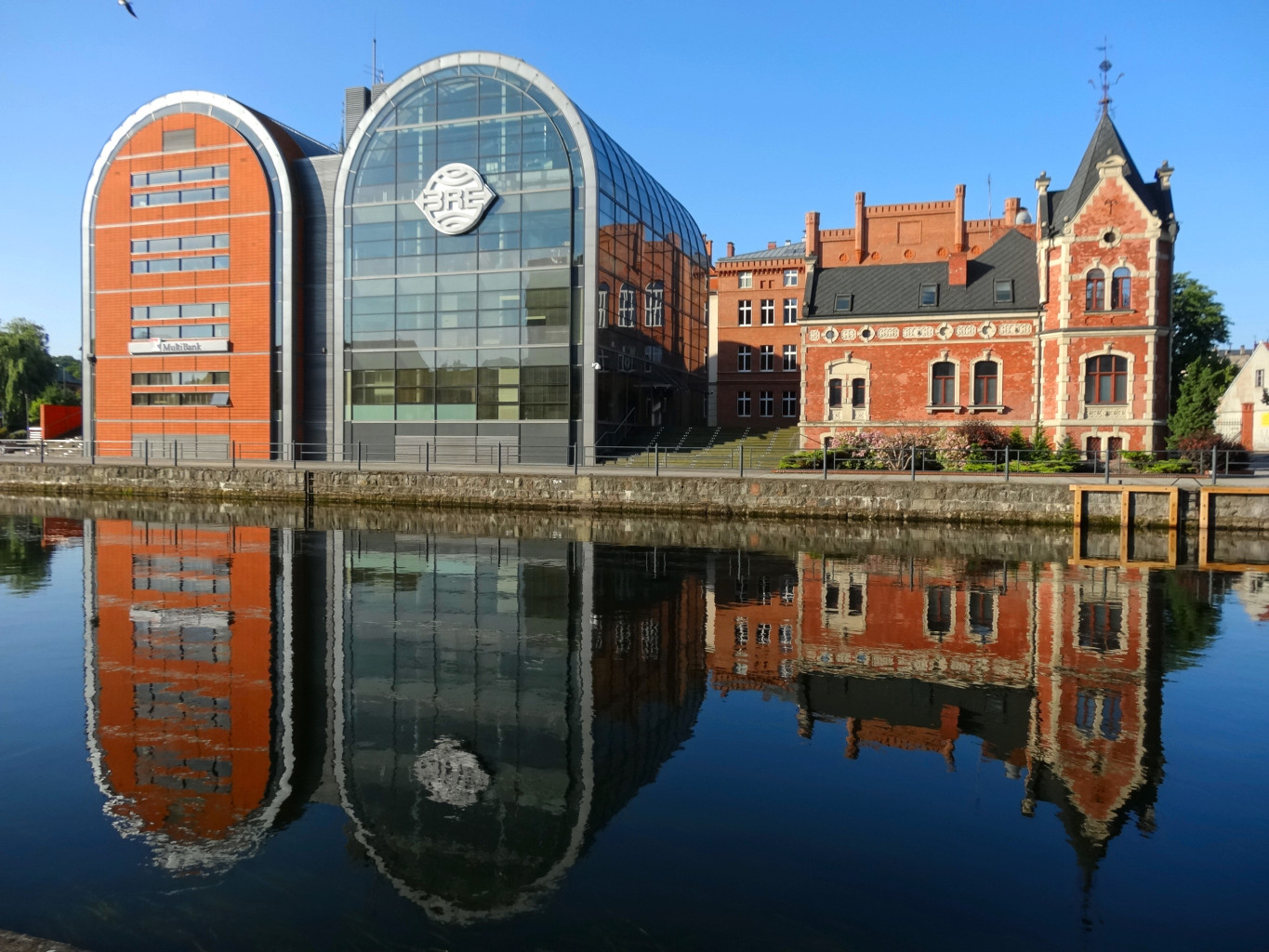 Zespół budynków BRE Banku w Bydgoszczy przy ulicy Grodzkiej, zwanych "szklanymi spichrzami", zbud. w 1998 r.